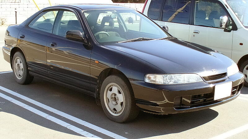 ホンダ・インテグラ（3代目4ドアハードトップ：日本仕様後期型）